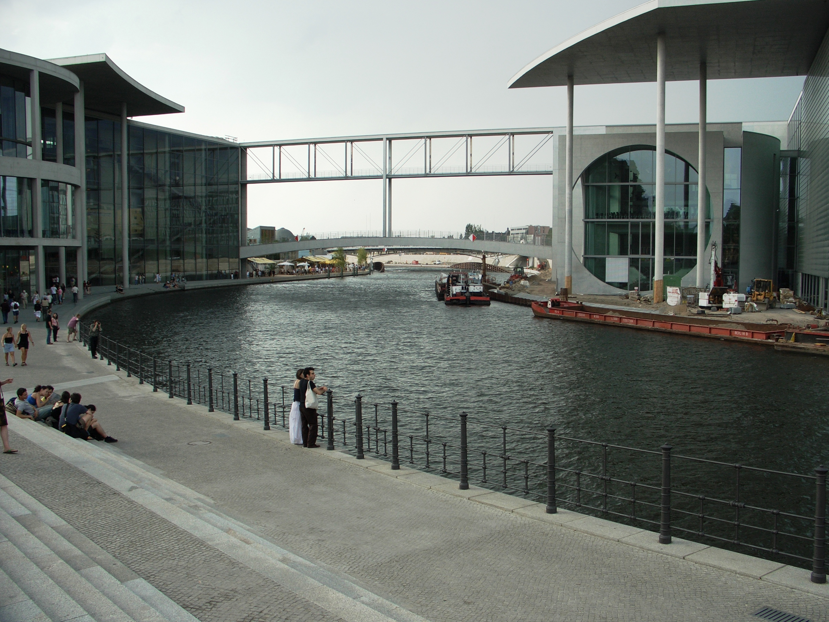 Berlín - Riu Spree